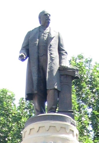 Detalle del monumento a Antonio Cánovas del Castillo frente al Senado.